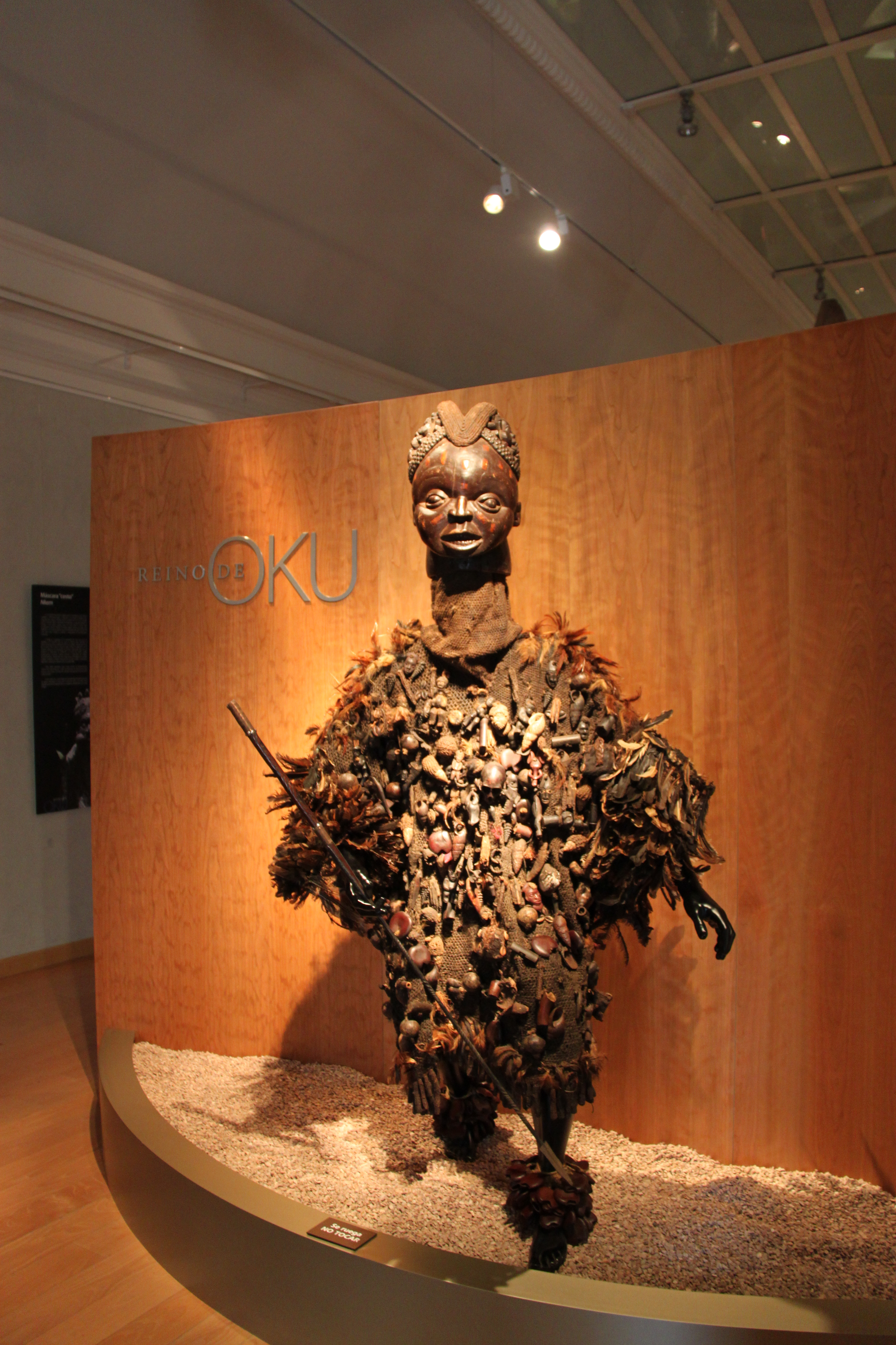 Entrada a la exposición "El Reino de Oku", donde se exhibe una de las máscaras y traje de la exposición.